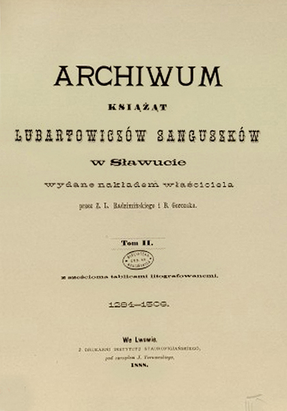 Архів князів Любартовичів-Сангушків. Том 2. Титульний аркуш видання